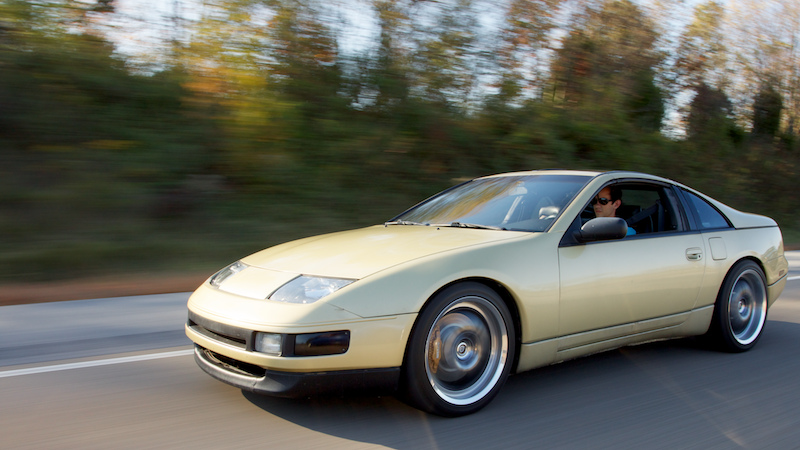 James' 300zx.